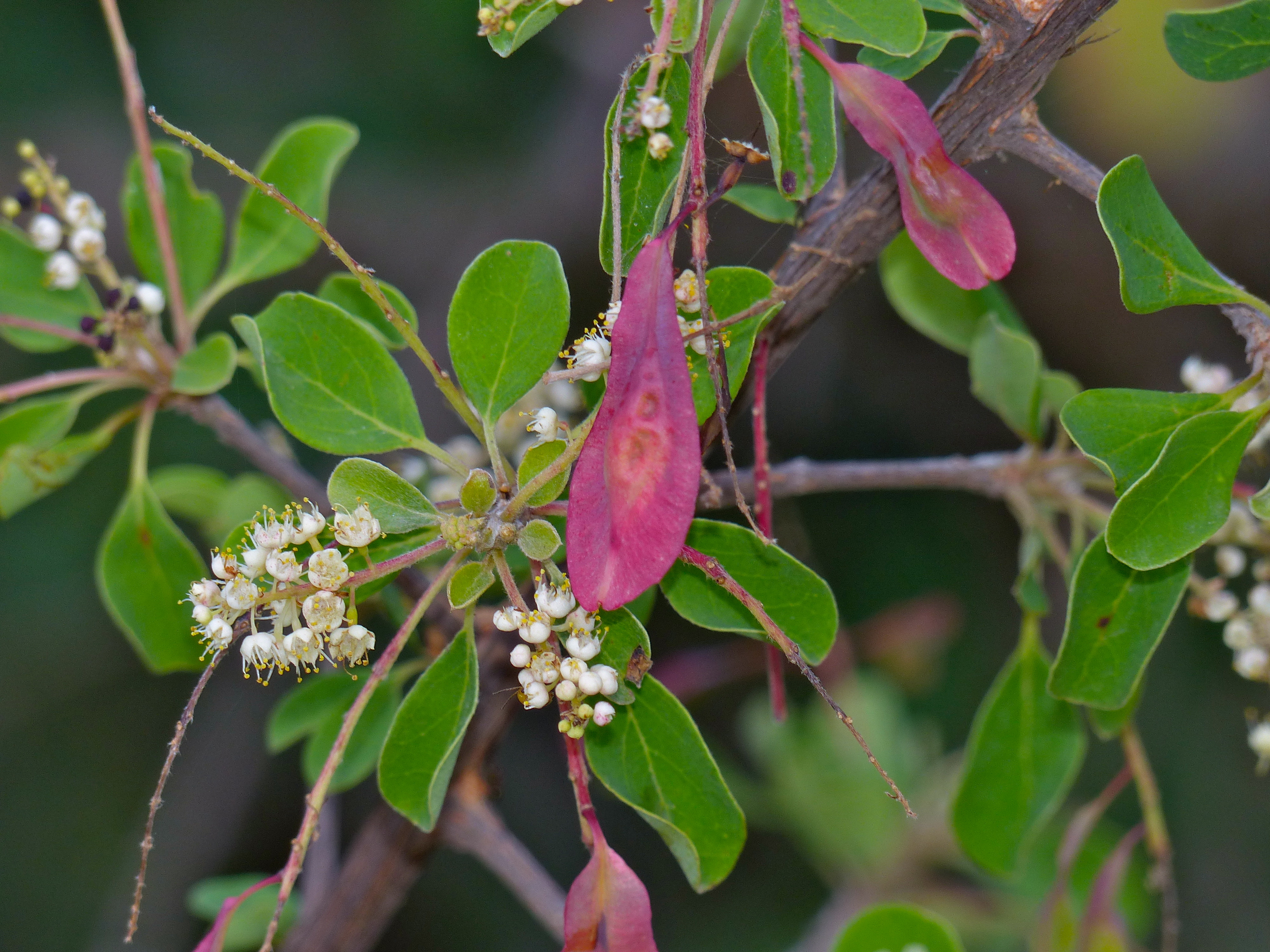 Bobbejaan Krans, H7 Road West of Satara, Kruger NP, SOUTH AFRICA